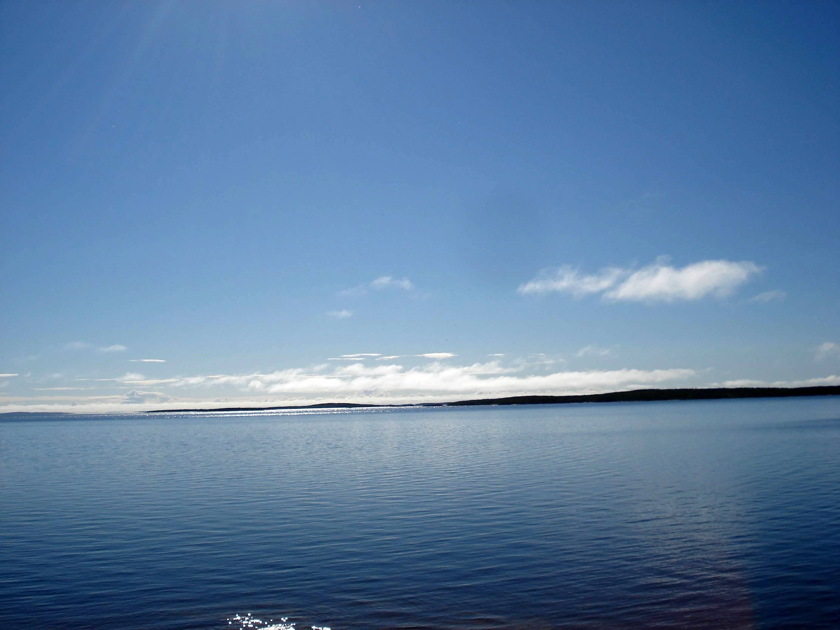 Réservoir Robert-Bourassa, à proximité de la centrale hydroélectrique Robert-Bourassa / Robert-Bourassa reservoir, near to Robert-Bourassa generating station